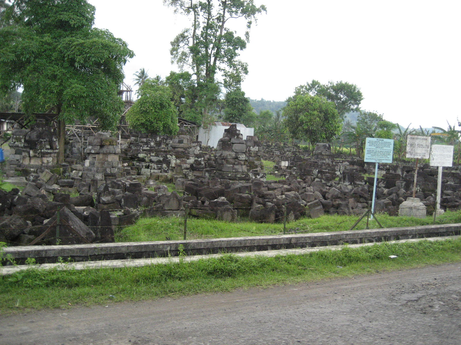 Ruins of Sojiwan temple in Central Java, Yogyakarta, Indonesia